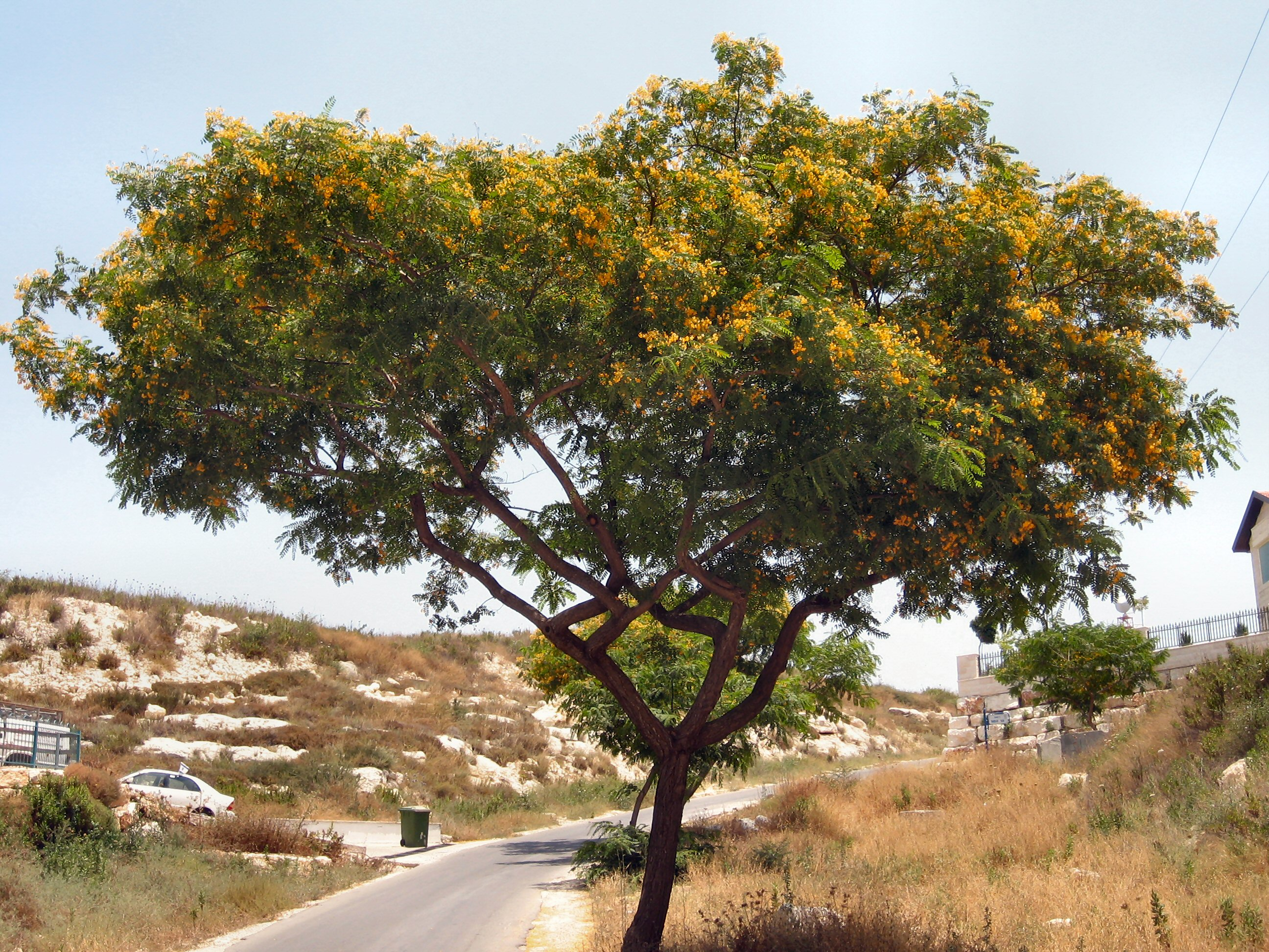 עץ מכנף נאה בפריחתו בצד דרך.